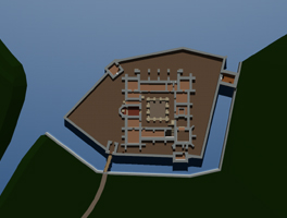 A tatai vár rekonstruált alaprajza a középkor végén, 1500 körül